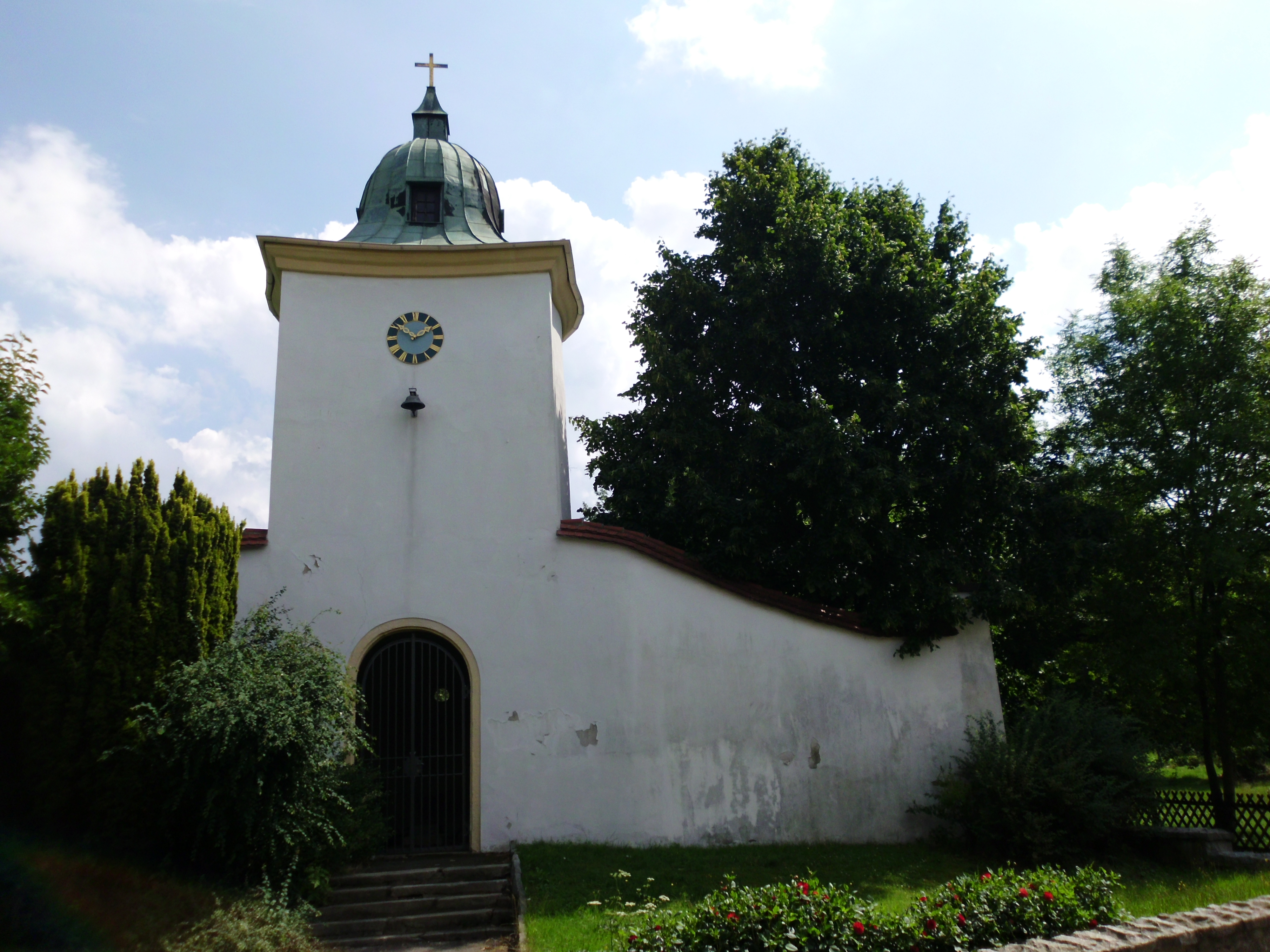 Schmochtitz, Bischof Benno Haus. Taufkapelle